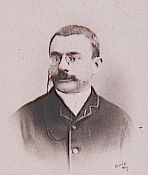 Théophile Delcassé (* 1. März 1852; † 22. Februar 1923), Staatsmann der französischen Dritten Republik